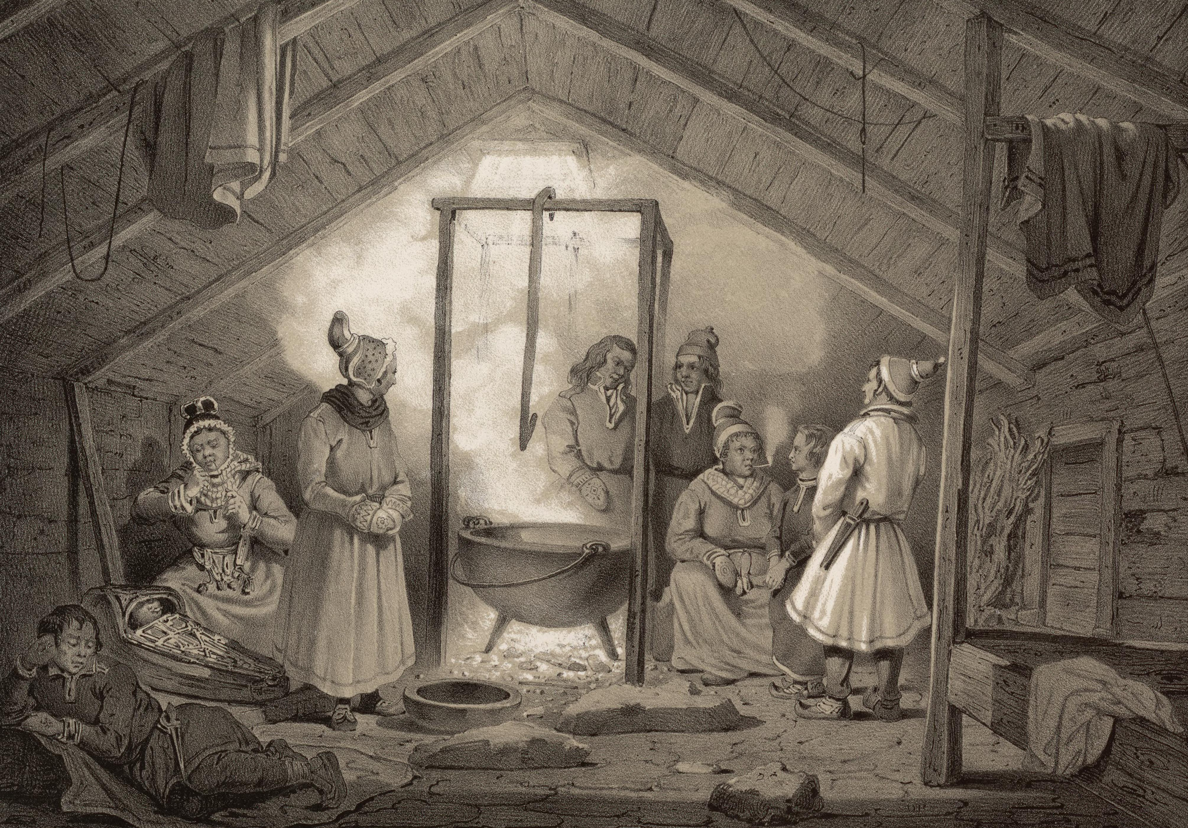 "Det indre af en bondehytte i Finmarken." Illustrasjon hentet fra boken "Norge fremstillet i Tegninger" av Asbjørnsen, P.Chr. og utgitt av Chr. Tønsberg (no, 1848)Søndagskledte samer i ei årestue. «Træhytter (...) forekomme kun undtagelsesvis, hos Sölapperne. Midt på Gulvet er det simple Ildsted af Stene, hvorfra Rögen udbreder sig under Taget for at stige op gjennem Röghullet; over dette (...) staaer et Stillads eller en galge (...) hvorpå den store Gryde ophænges (...) den er Kogeapparat, Madfad og Vadske-balle (...)